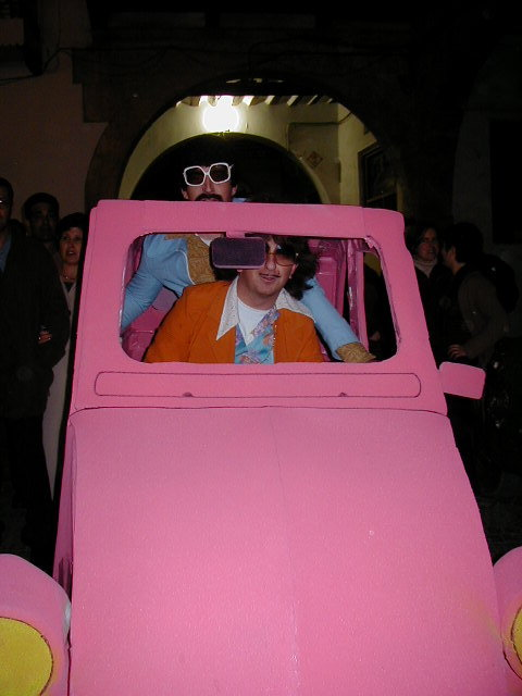 Numero de carnaval. Higinio y Futi en estado puro. Carnaval de Tarazona de la Mancha (Albacete)